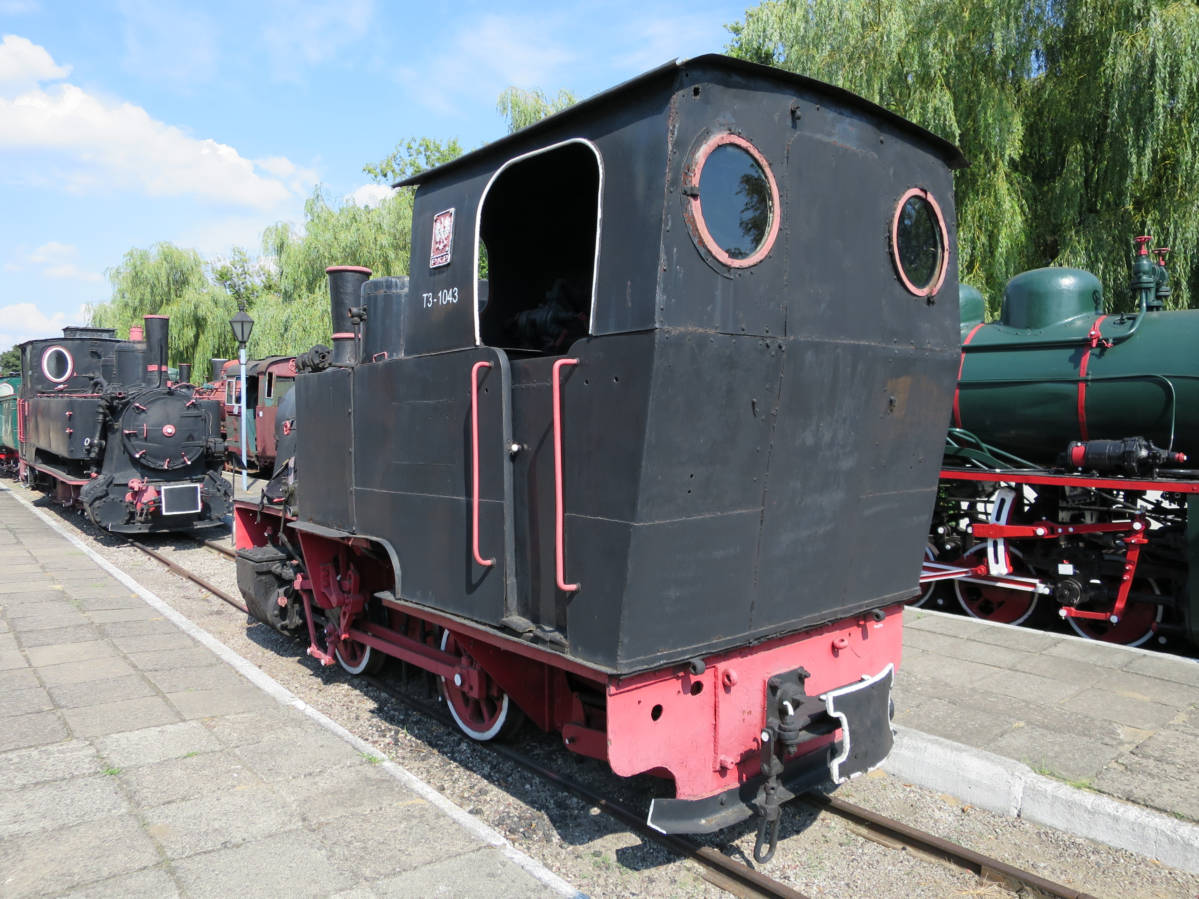 Muzeum Kolei Wąskotorowej w Sochaczewie This photo was taken during Railway Wikiexpedition 2015 set up by Wikimedia Polska Association in cooperation with Fundacja Grupy PKP. You can see all photographs in category Wikiekspedycja kolejowa 2015.